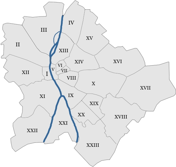 map hungary budapest districts